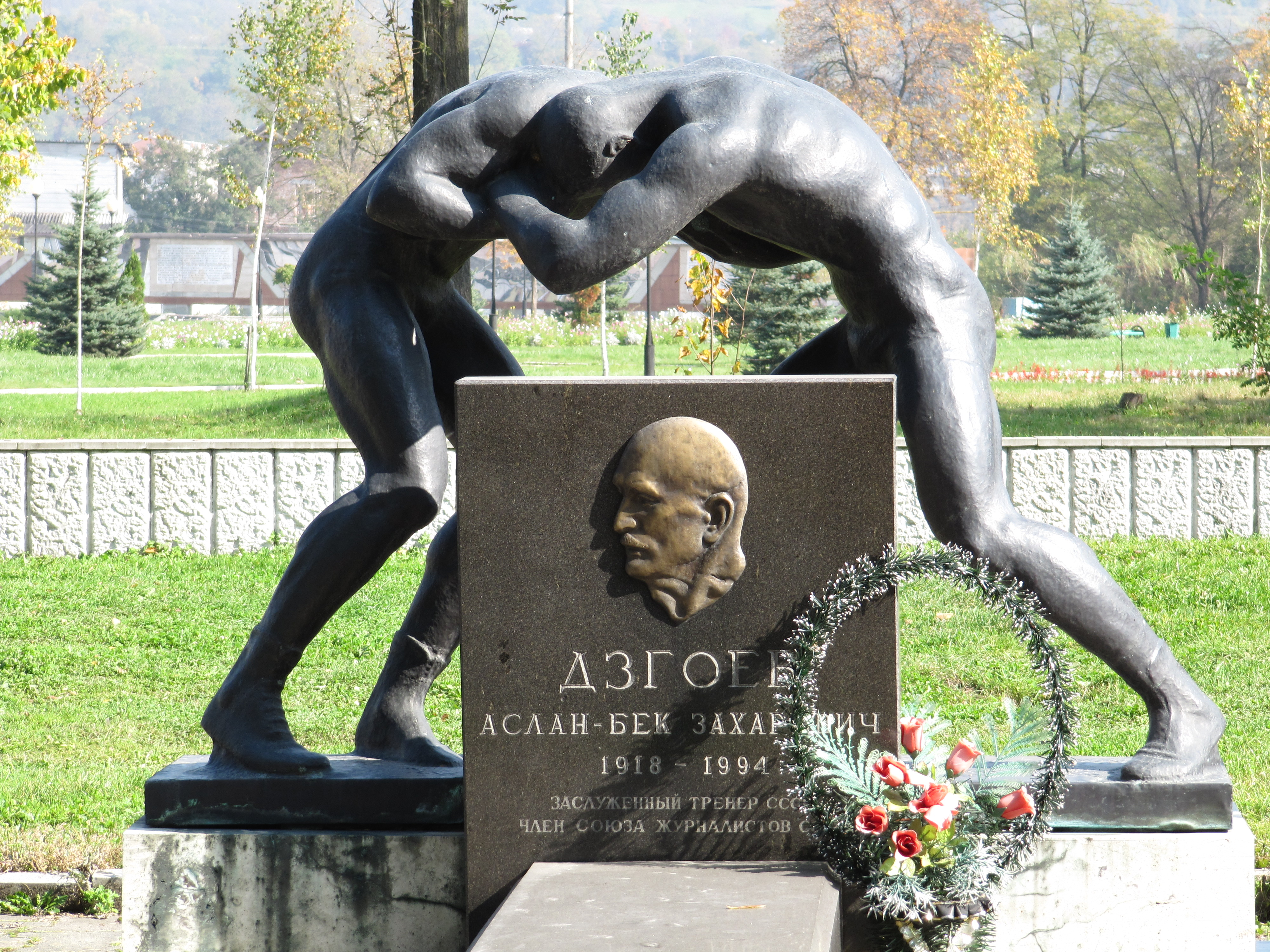 Памятник Дзгоеву Аслан-Беку на мемориальном кладбище во Владикавказе, Северная Осетия